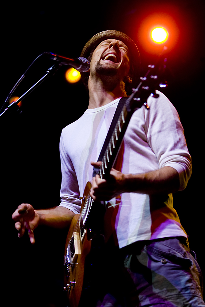 Jason Mraz at Campo Pequeno, March 19, 2009